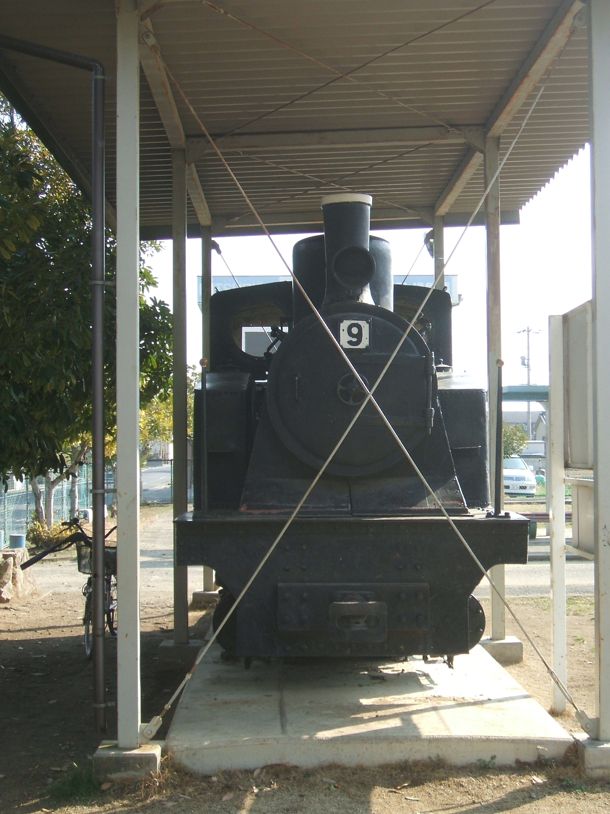 釜石鉱山鉄道E形蒸気機関車を保存場所である井原市の公園で撮影